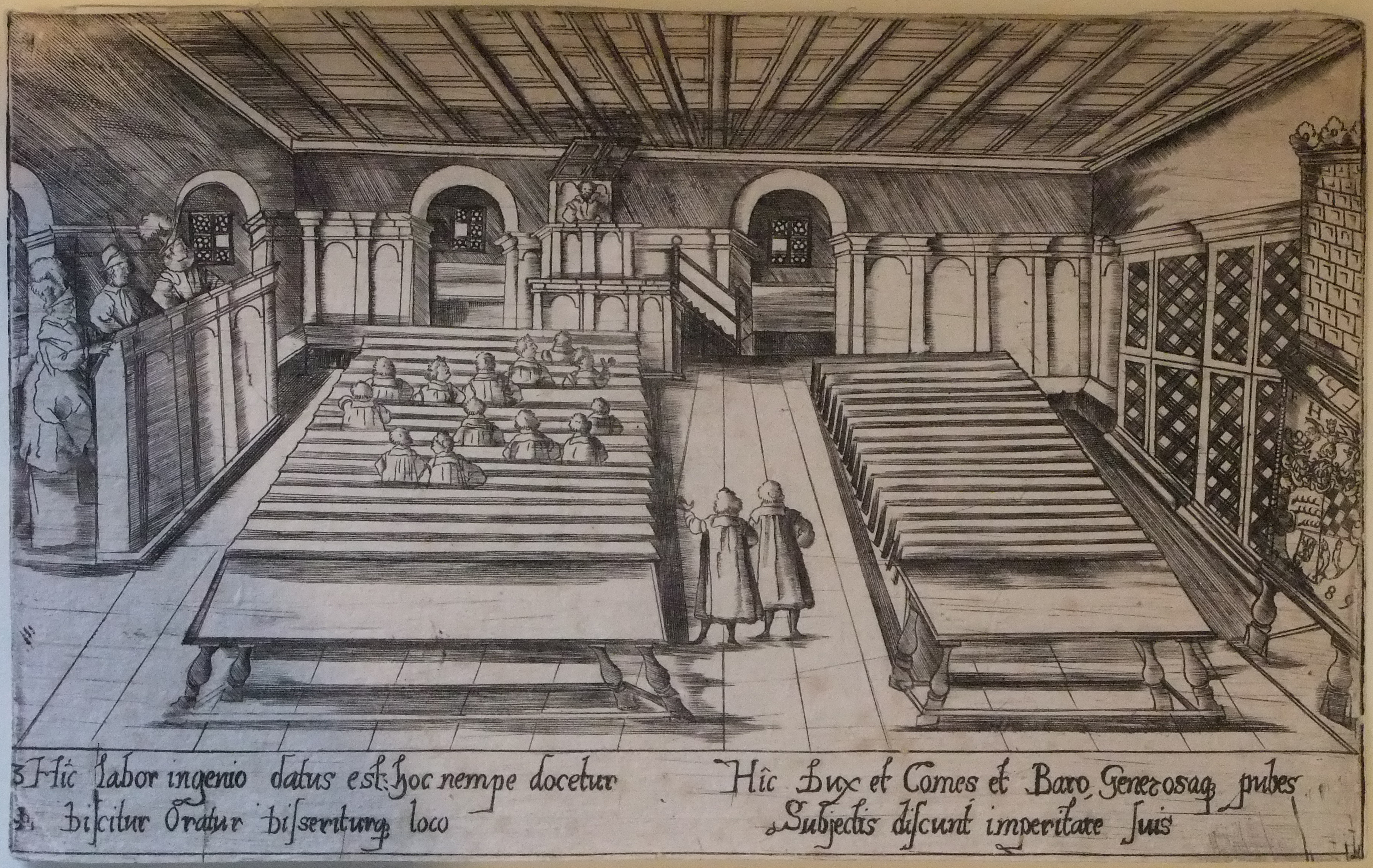 Collegium Illustre. Vorlesungssaal (Radierung; Stadtmuseum Tübingen Inv. 1083)